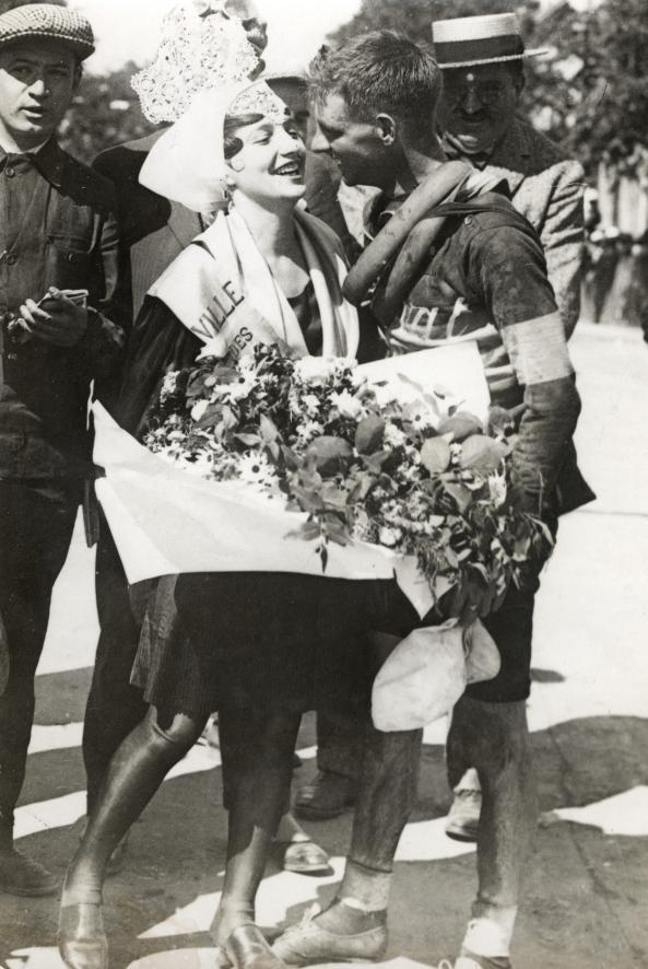 Spaarnestad Photo, SFA022004642 De Australiër Hubert Opperman ontvangt na de zesde etappe (Vannes-Les Sables d'Olonne, 204 km) bloemen en kussen van het mooiste meisje uit Sables, Frankrijk. Tour de France 1928. Collectie SPAARNESTAD PHOTO/Het Leven Kisses and flowers from the local beauty for Hubert Opperman after the 6th stage (Vannes-Les Sables d'Olonne, 204 km). France, Sables. Tour de France 1928. Voor meer informatie en voor meer foto’s uit de collectie van Spaarnestad Photo, bezoek onze Beeldbank: U kunt ons helpen onze kennis van de fotocollecties te verrijken door tags en commentaren toe te voegen. Herkent u mensen of locaties of heeft u een bijzonder verhaal te vertellen bij één van de foto’s, laat dan een reactie achter (als u ingelogd bent bij Flickr) of stuur een mailtje naar: You can help us gain more knowledge on the content of our collection by simply adding a comment with information. If you do not wish to log in, you can write an e-mail to